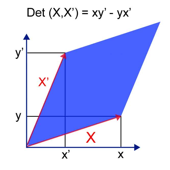 Image illustrant le déterminant de deux vecteurs, en fonction de la surface d'une aire.